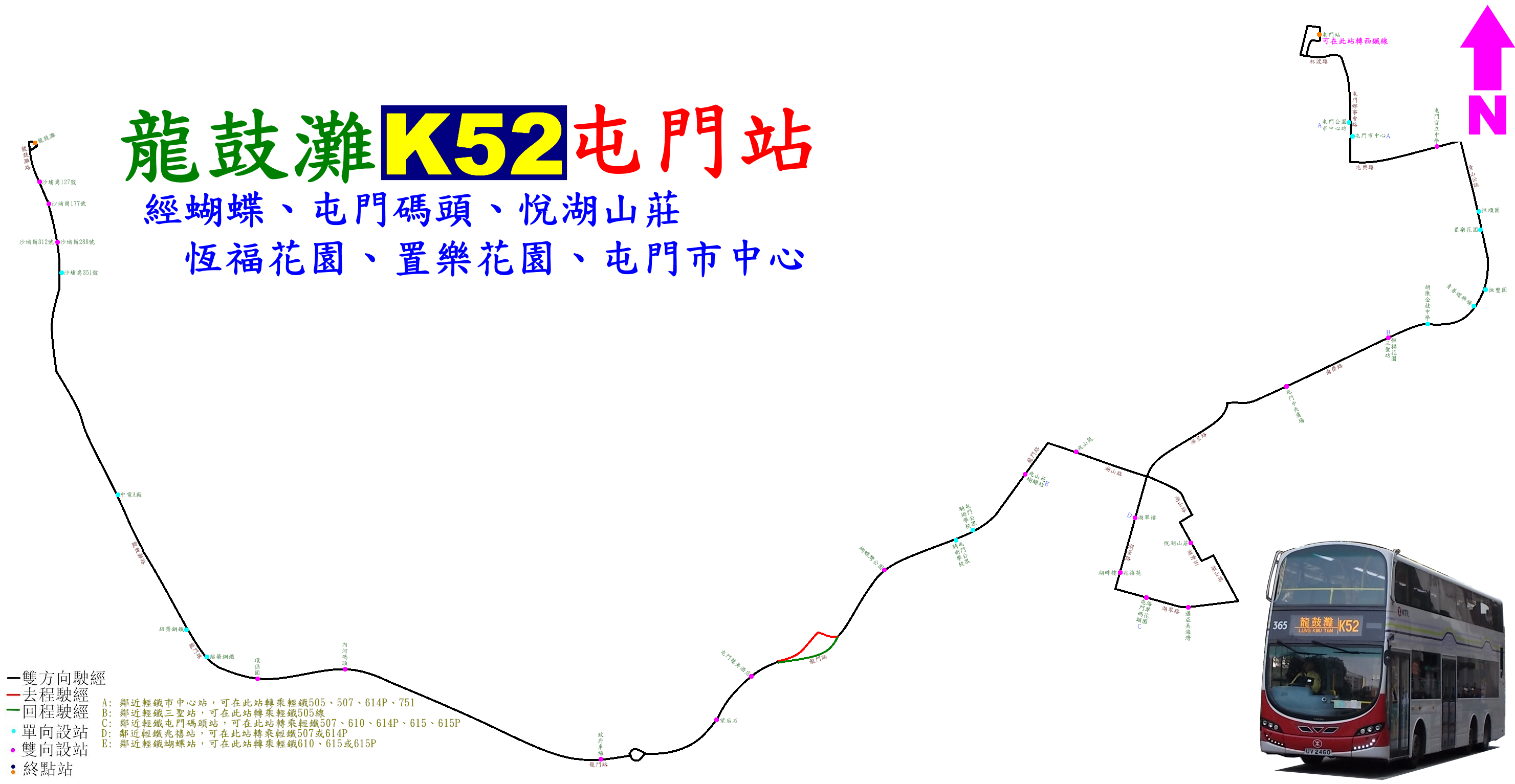 中文（香港）: 港鐵巴士K52線的地圖式路線圖